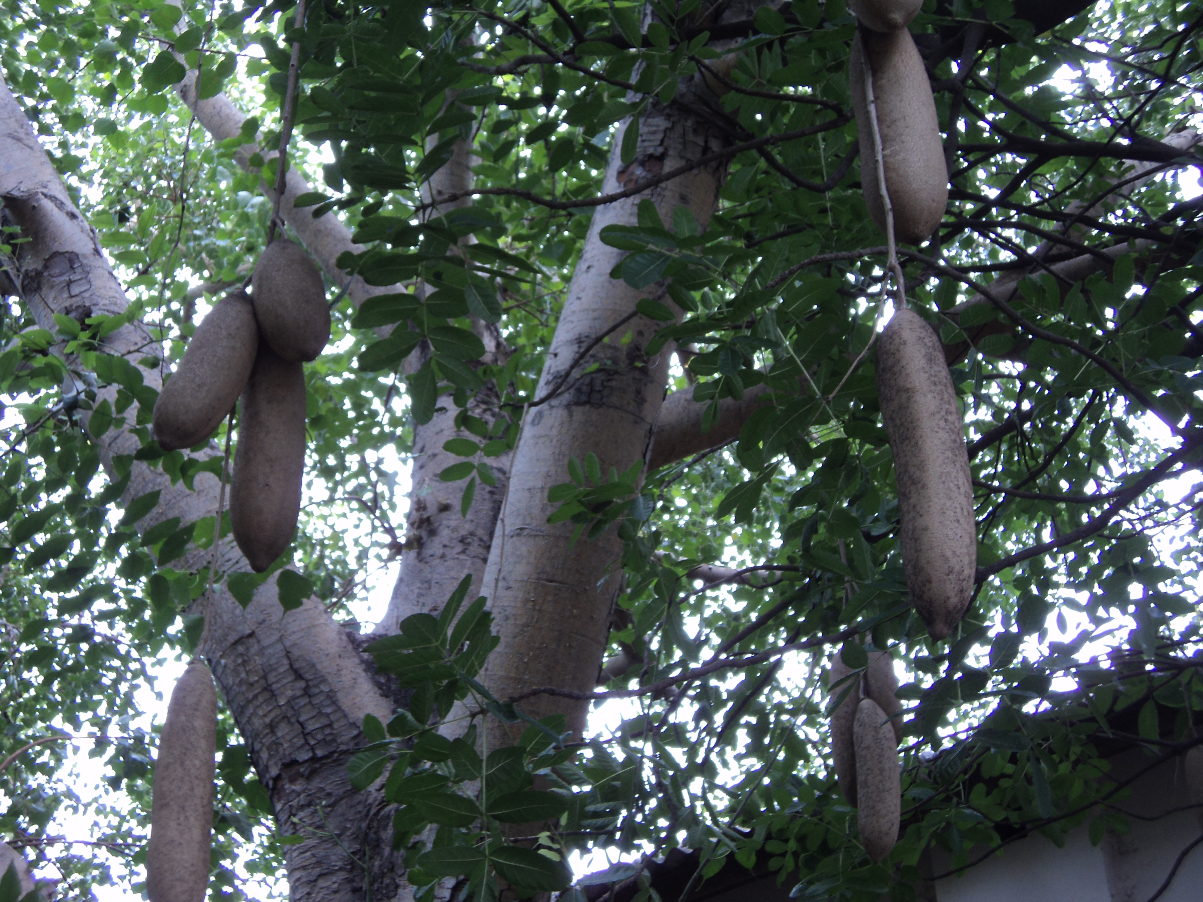 Sausage Tree found at Anna University, Adaiyaaru,Chennai அண்ணா பல்கலைக் கழகம், அடையாறு சென்னையில் எடுக்கப்பட்ட மரச் சுரக்காய் மரம்